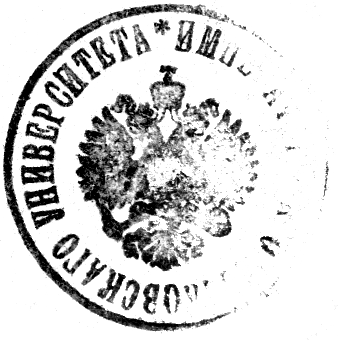 Печать Императорского московского университета, 1912 год.